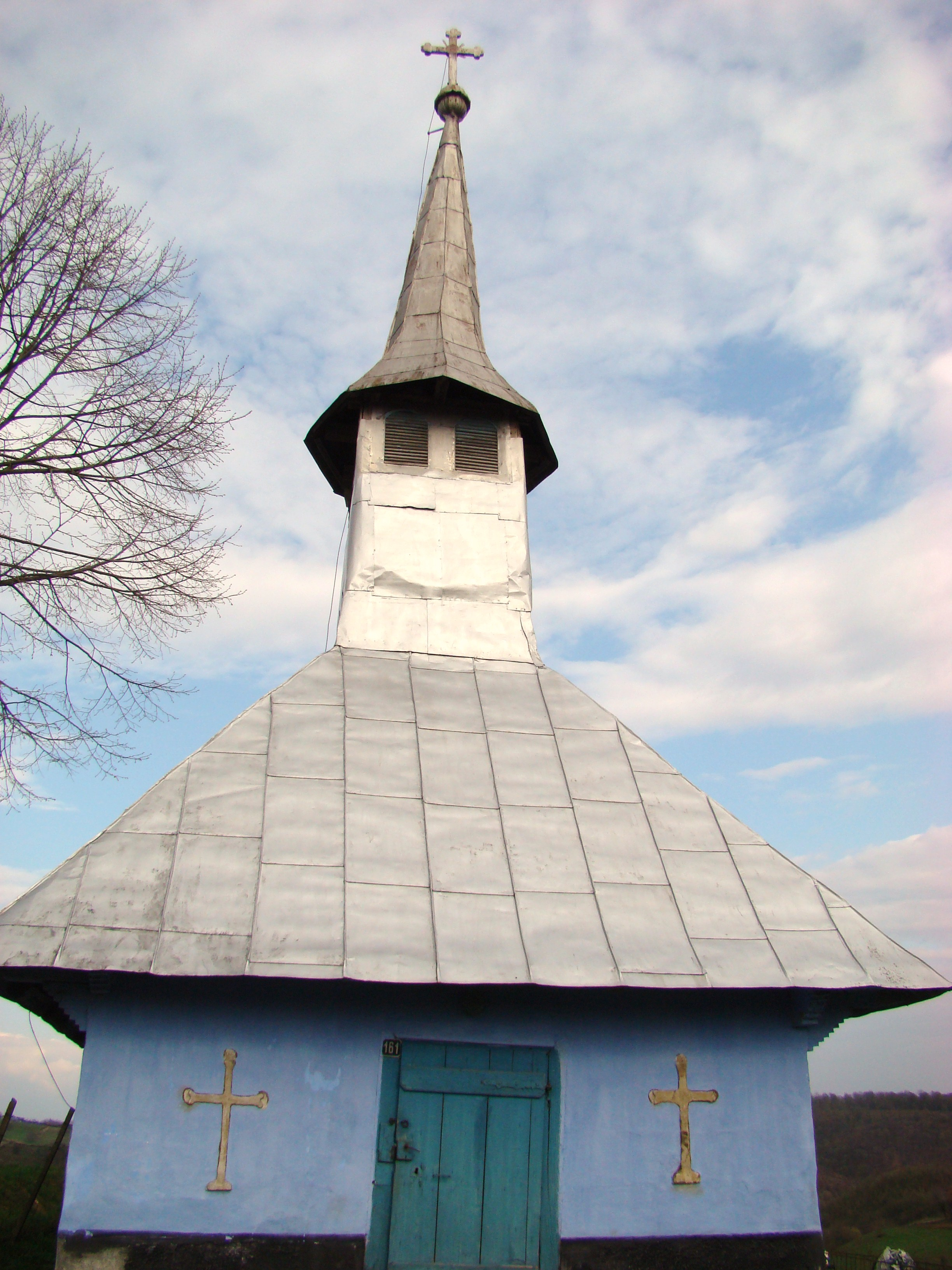 Biserica de lemn din Bucuroaia, județul Bihor